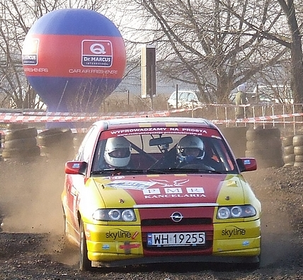 PMR - Skyline ( Załoga: Z. Szwagierczak, M. R. Pietrzak ), 49 Rajd Barborka 2011, Odcinek Bemowo